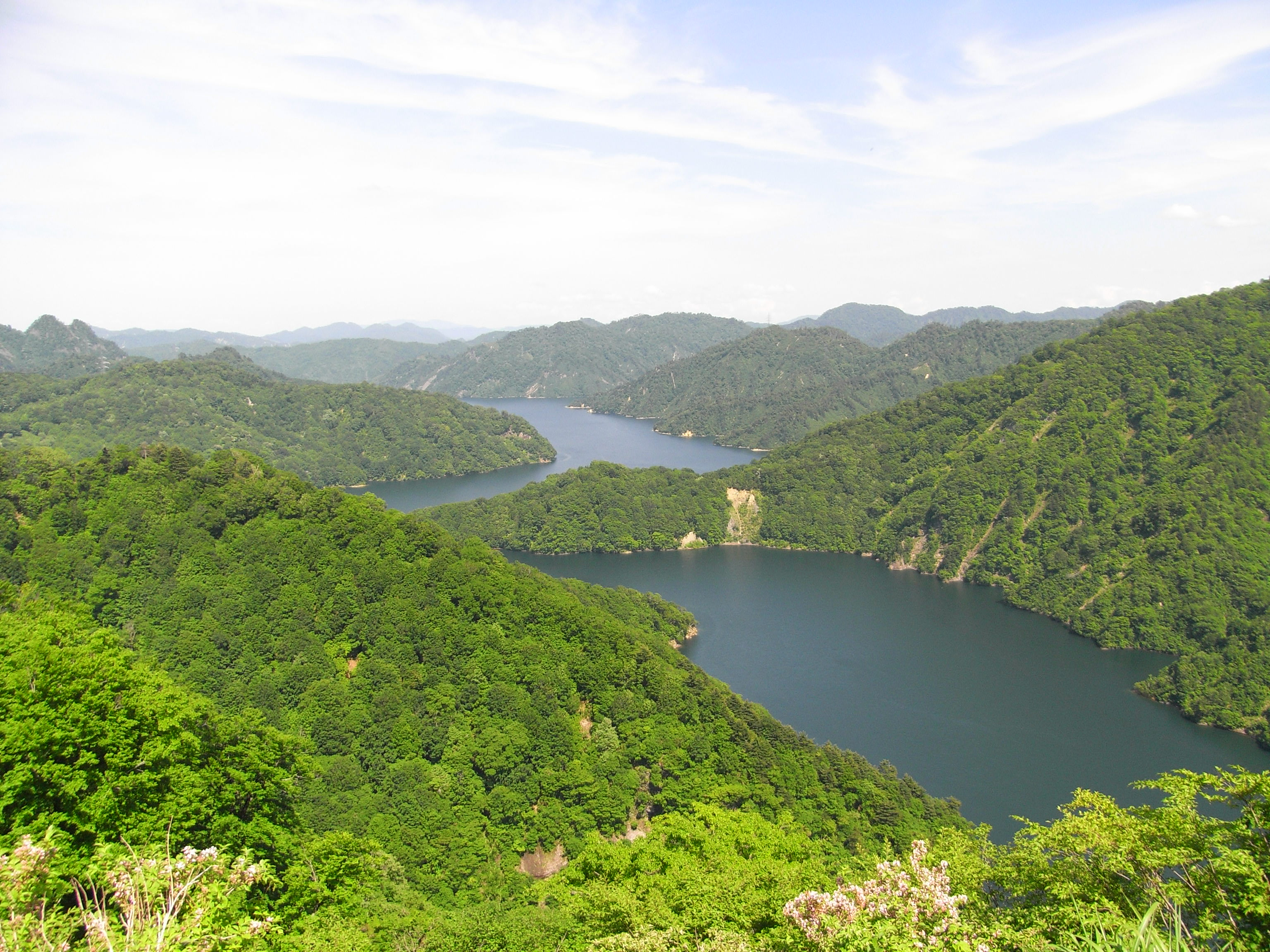 Lake